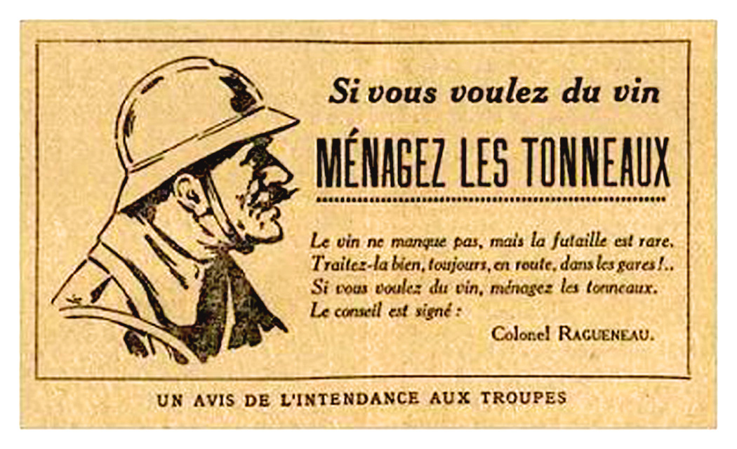 Ménagez les tonneaux